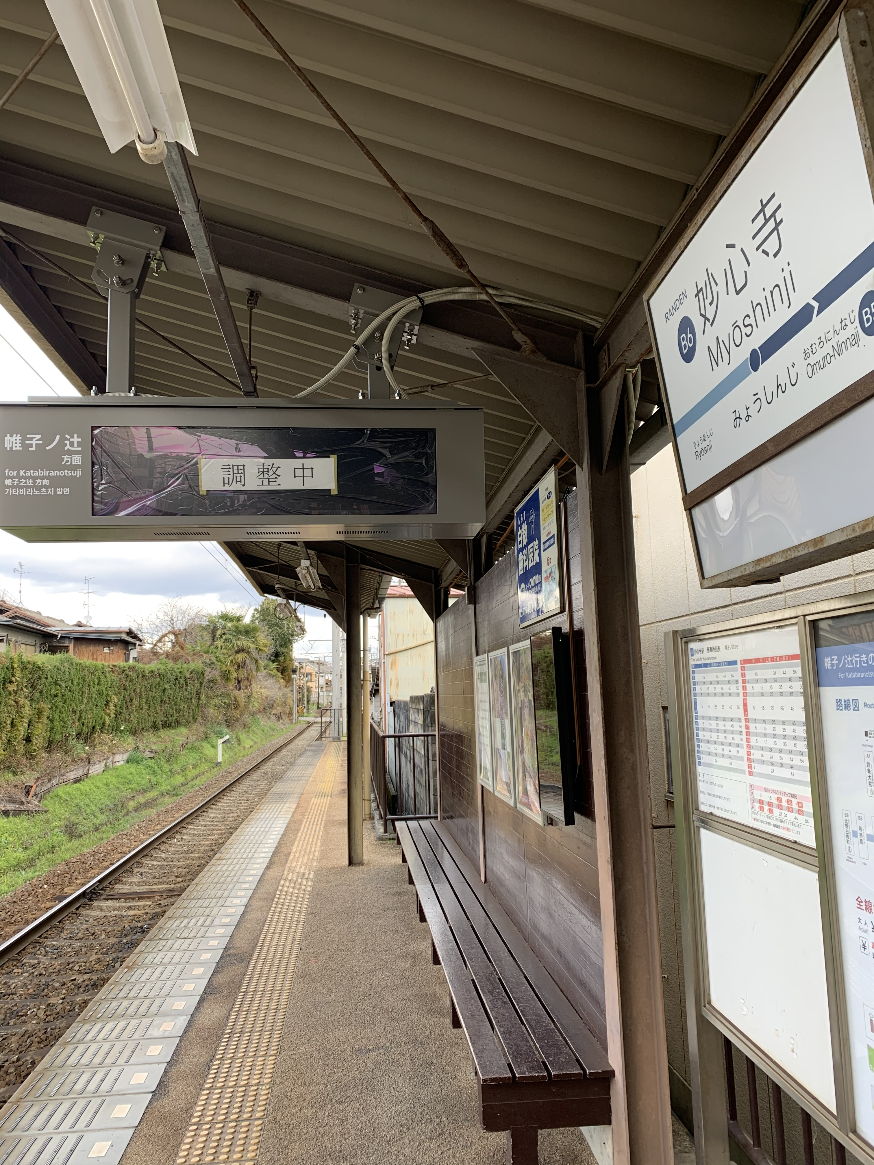 妙心寺駅帷子ノ辻行きホームから龍安寺方を望む